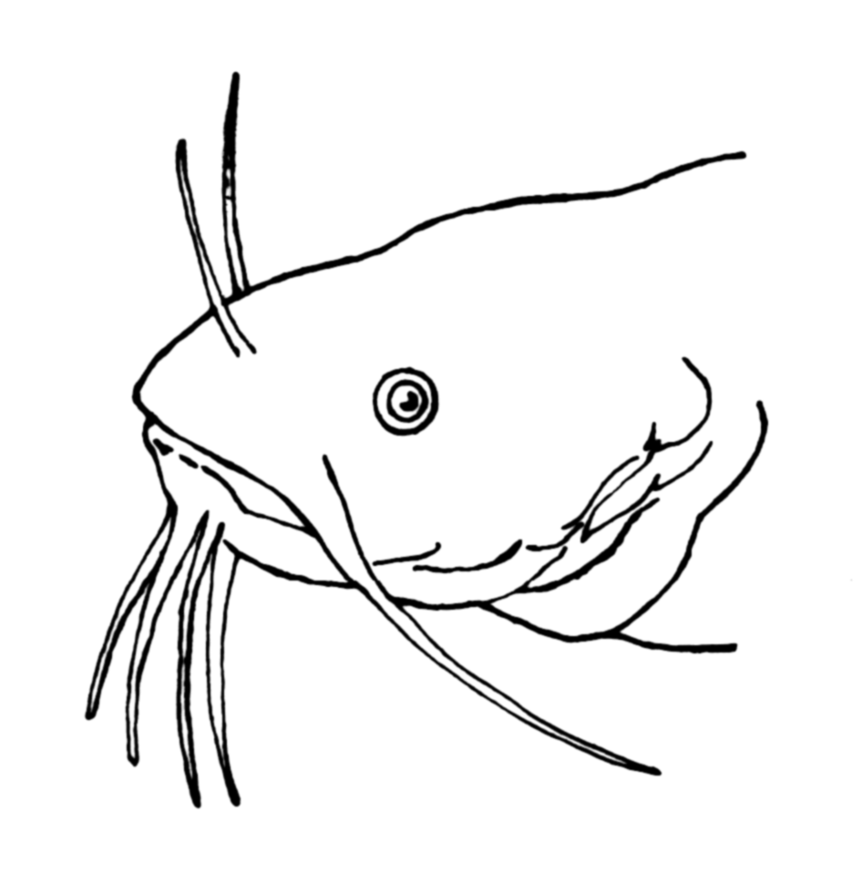 Barbel